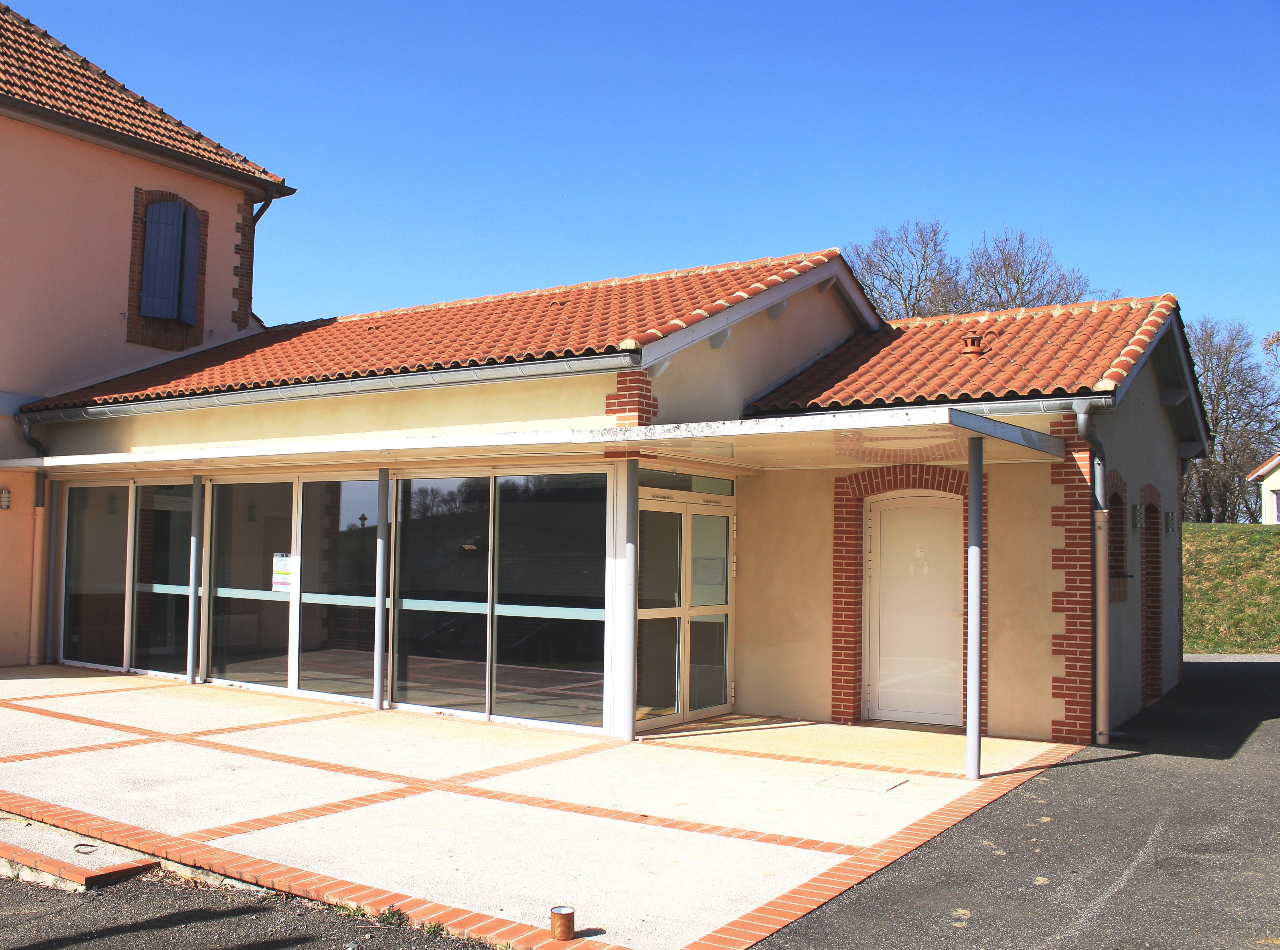 Salle des fêtes de Bouilh-Devant (Hautes-Pyrénées)